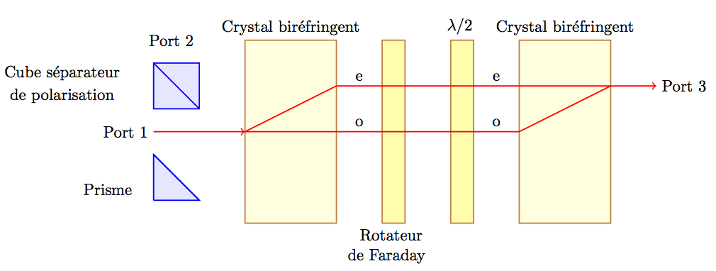 Schéma de principe d'un circulateur optique.